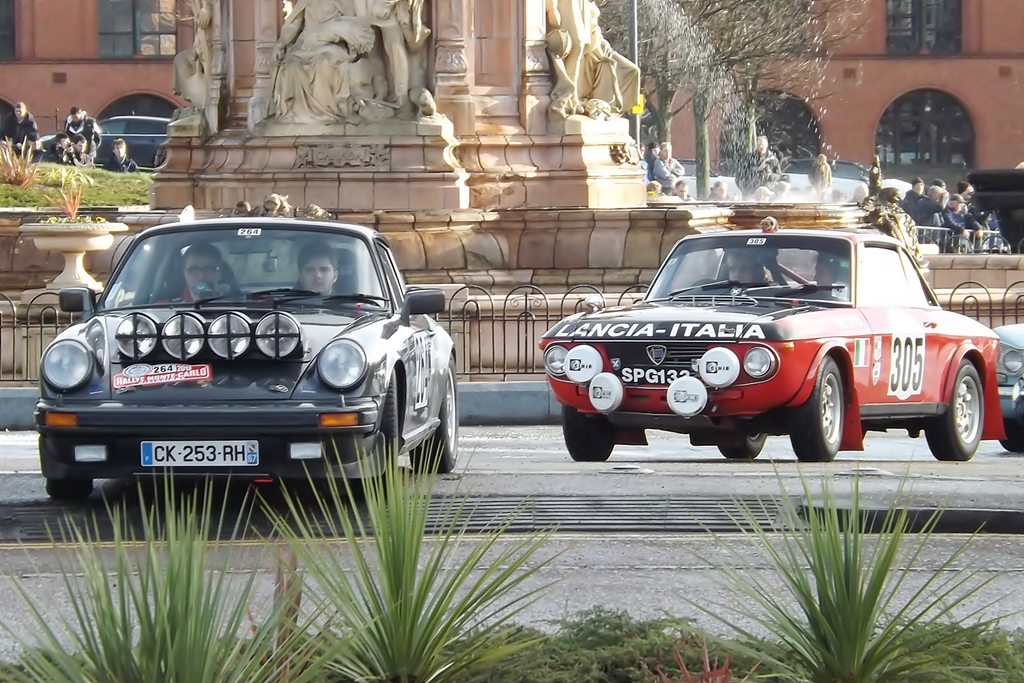 Porsche 911 Carrera and Lancia Fulvia Coupe